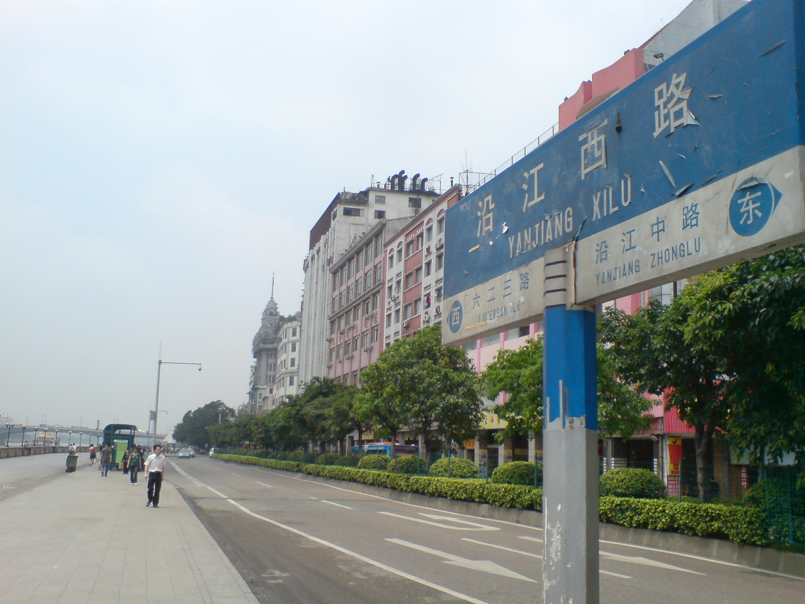 广州沿江西路